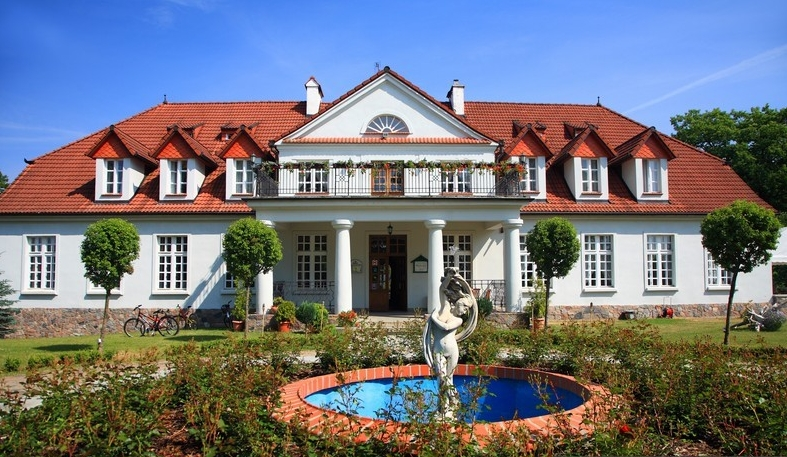 Dwór w Bychowie, Bychowo, województwo pomorskie, powiat wejherowski, gmina Gniewino.